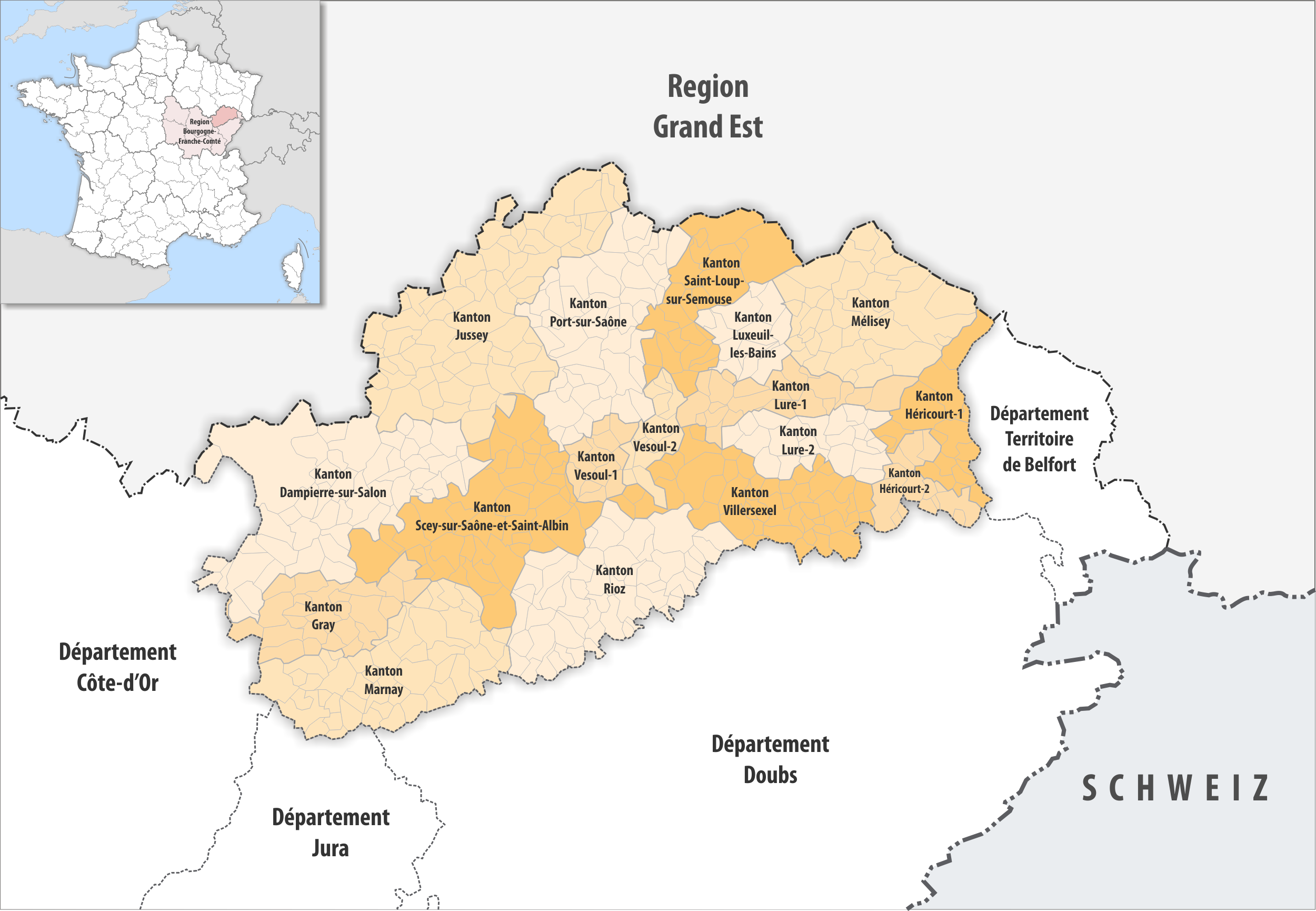 Gemeinden und Kantone im Departement Haute-Saône